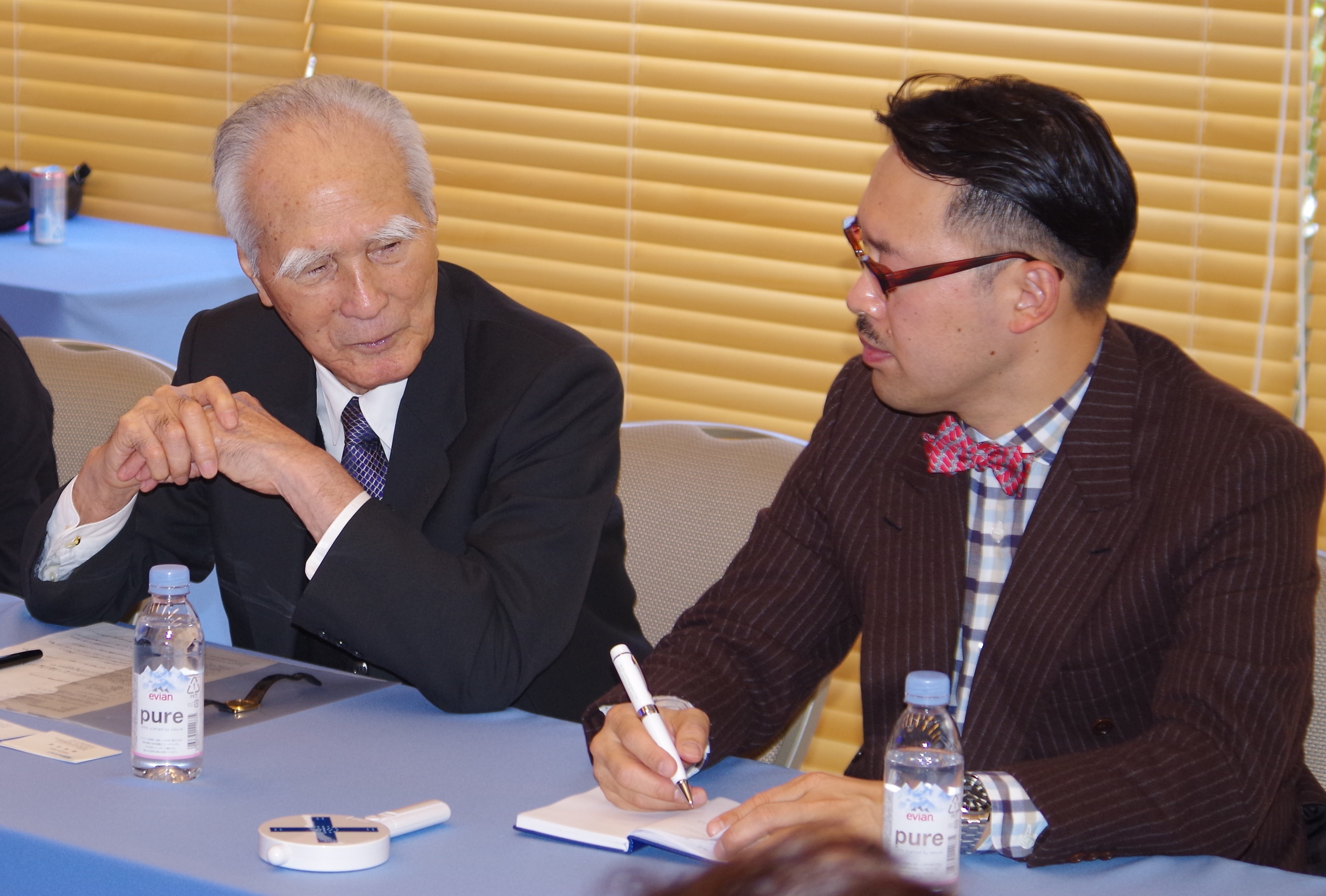 Murayama and Okabe